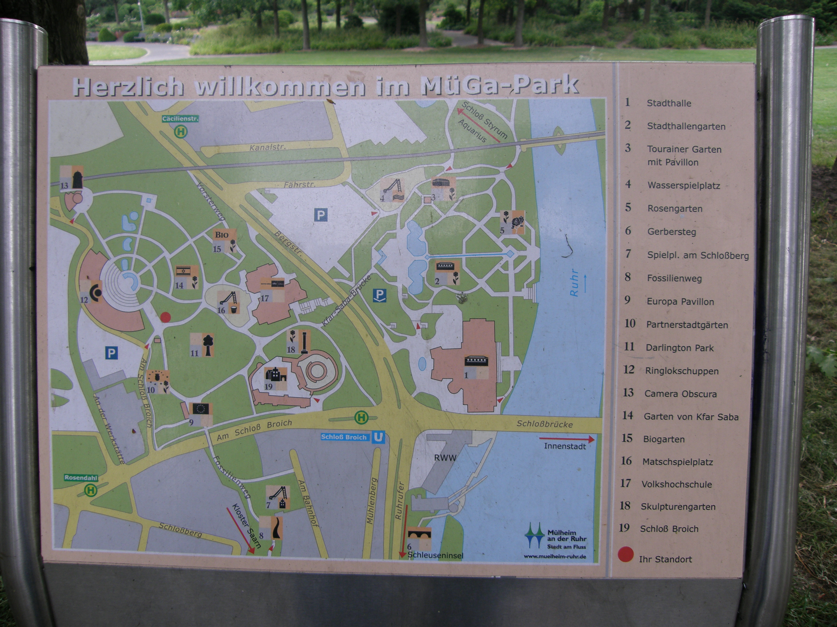 Mülheimer Gartenschau oder Mülheims Garten an der Ruhr oder kurz nur MüGa genannt. Lageplan